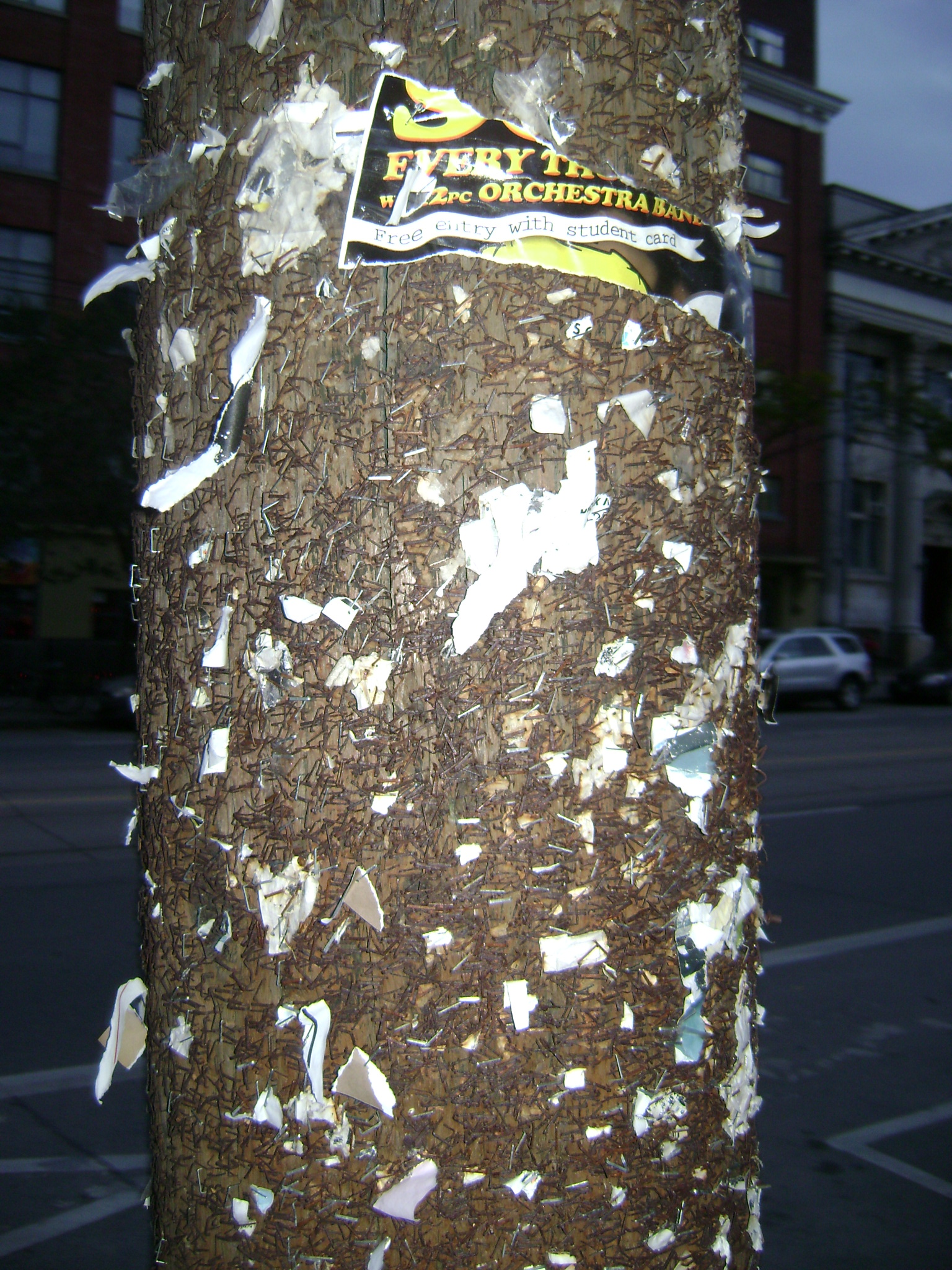 Poste repleto de grampos na College Street, na Little Italy, em Toronto, Ontário, Canadá.